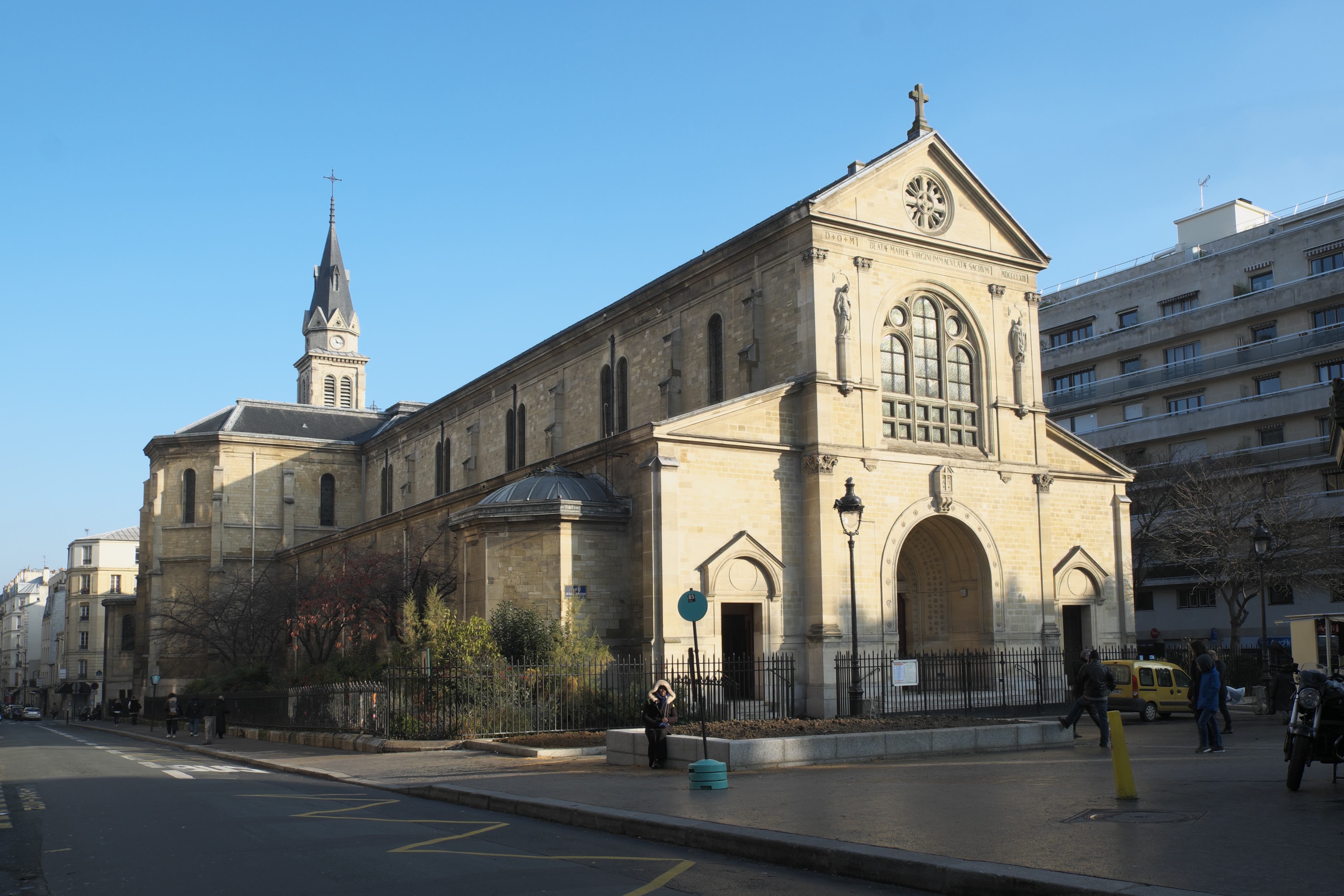 Katholische Kirche Notre-Dame de Clignancourt im 18. Arrondissement in Paris (Île-de-France/Frankreich)